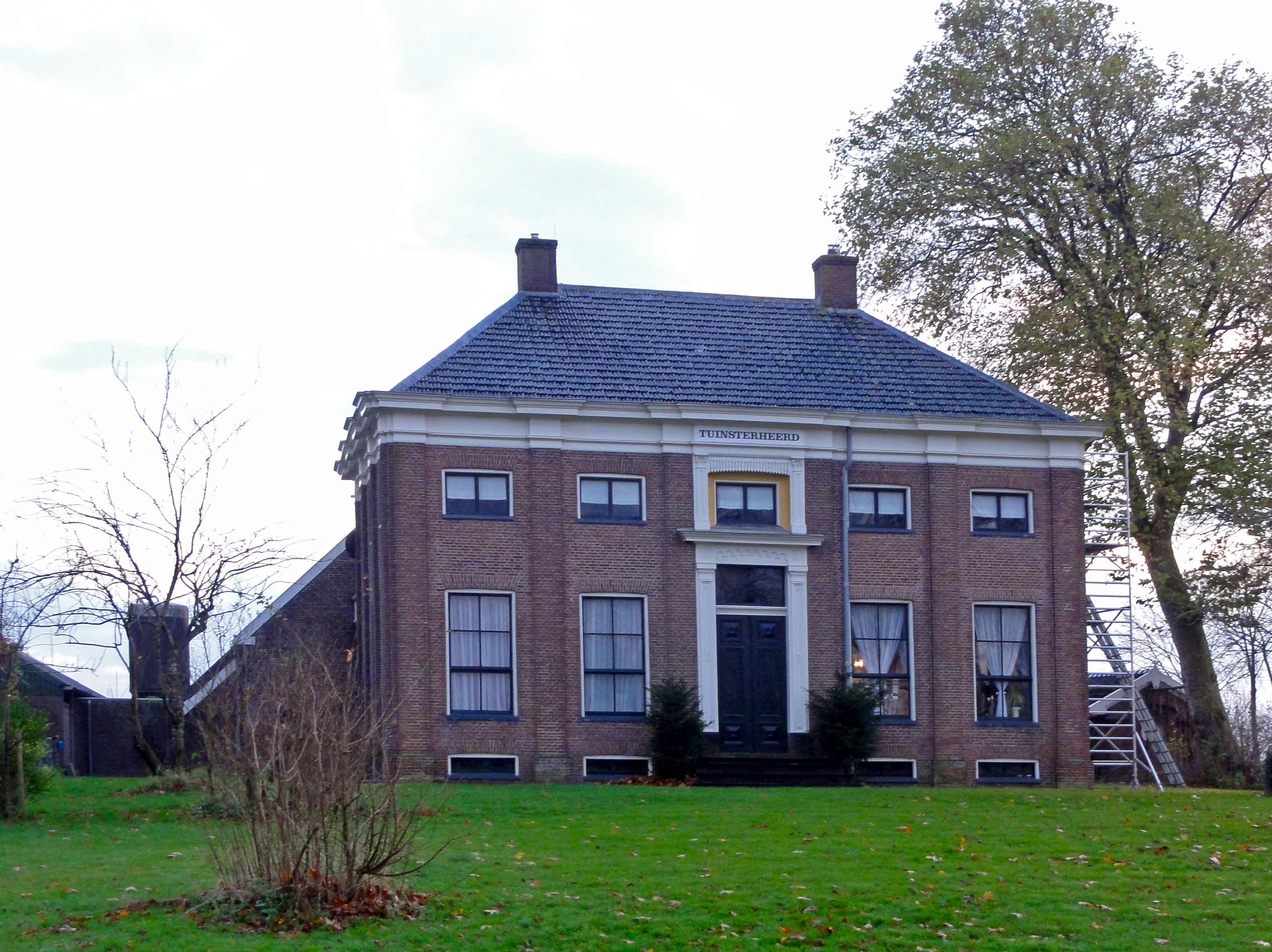 Boerderij Tuinsterheerd aan de Wierde 33 te Leens